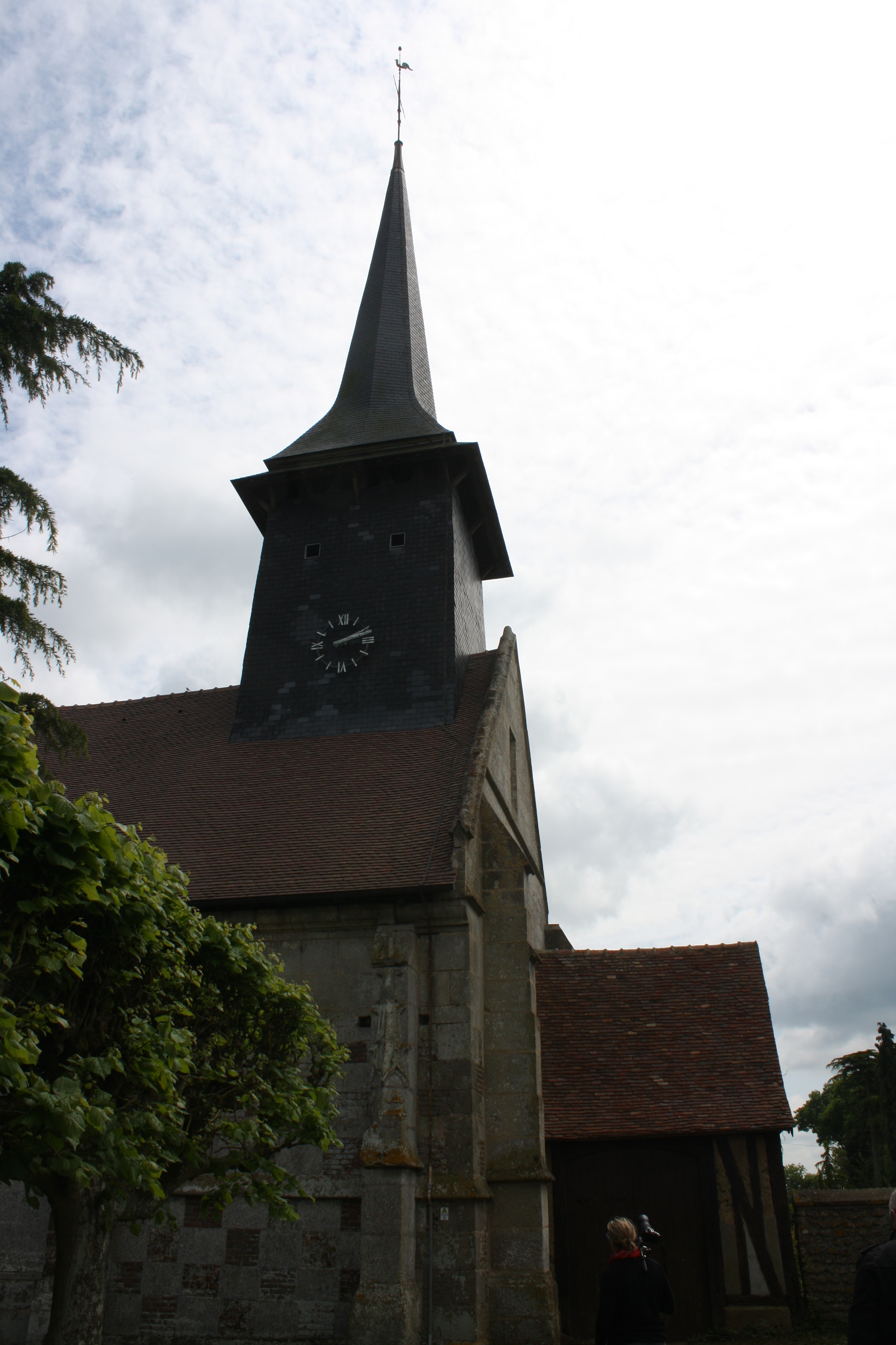 EGLISE DE LA COMMUNE HISTORIQUE DU CHESNE